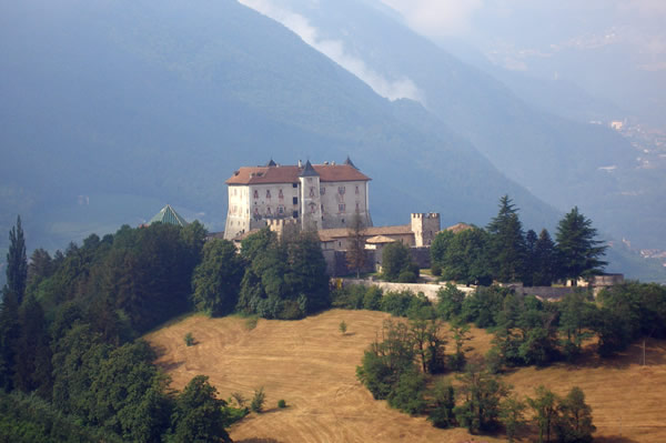 Castel Thun visto da Nord-Est. Foto personale. Ton, 25 giugno 2006. Copyright (c) 2006 Luca Marcolla.